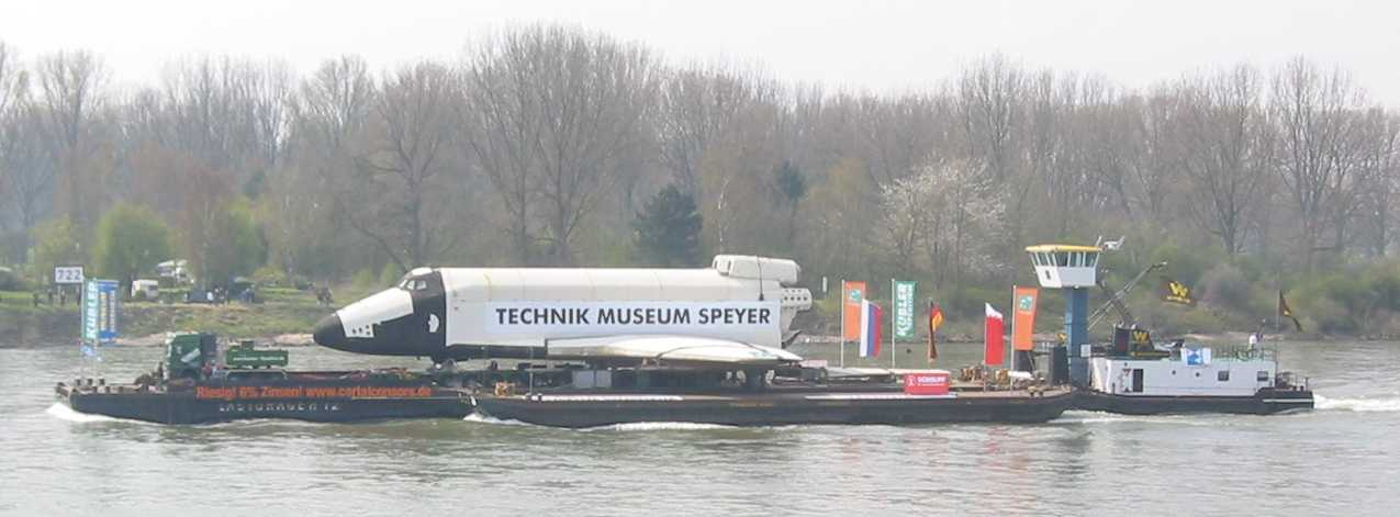 9 km/h statt 29 000 km/h. Buran auf Binnenschiff: Transport ins Technik-Museum Speyer auf dem Rhein in Höhe Düsseldorf-Benrath